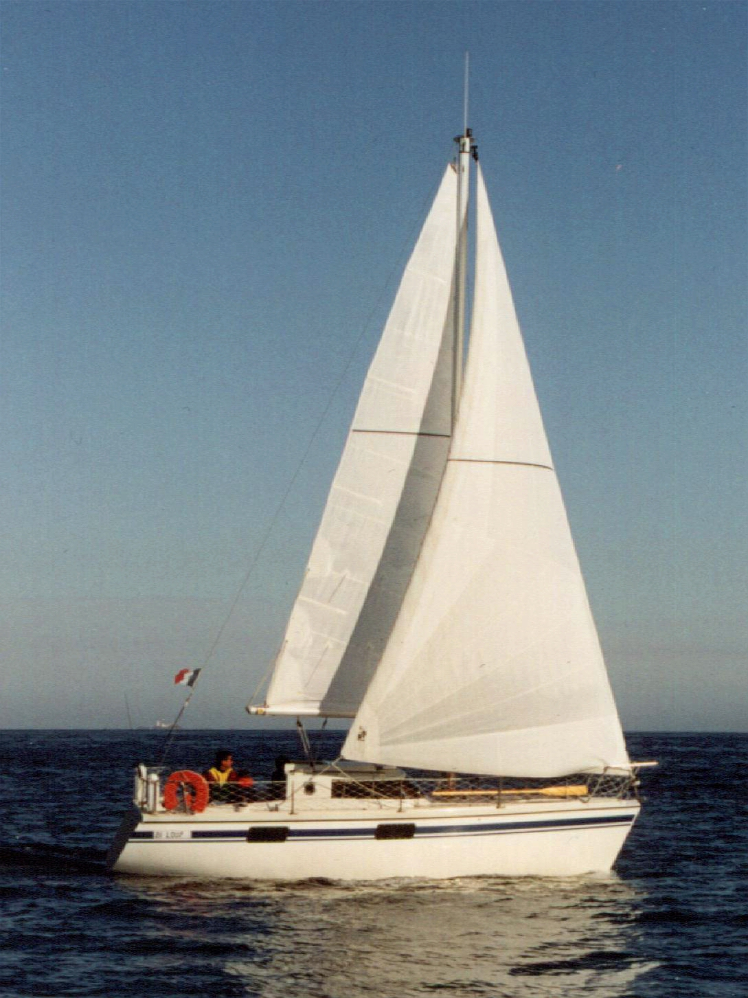 Biloup